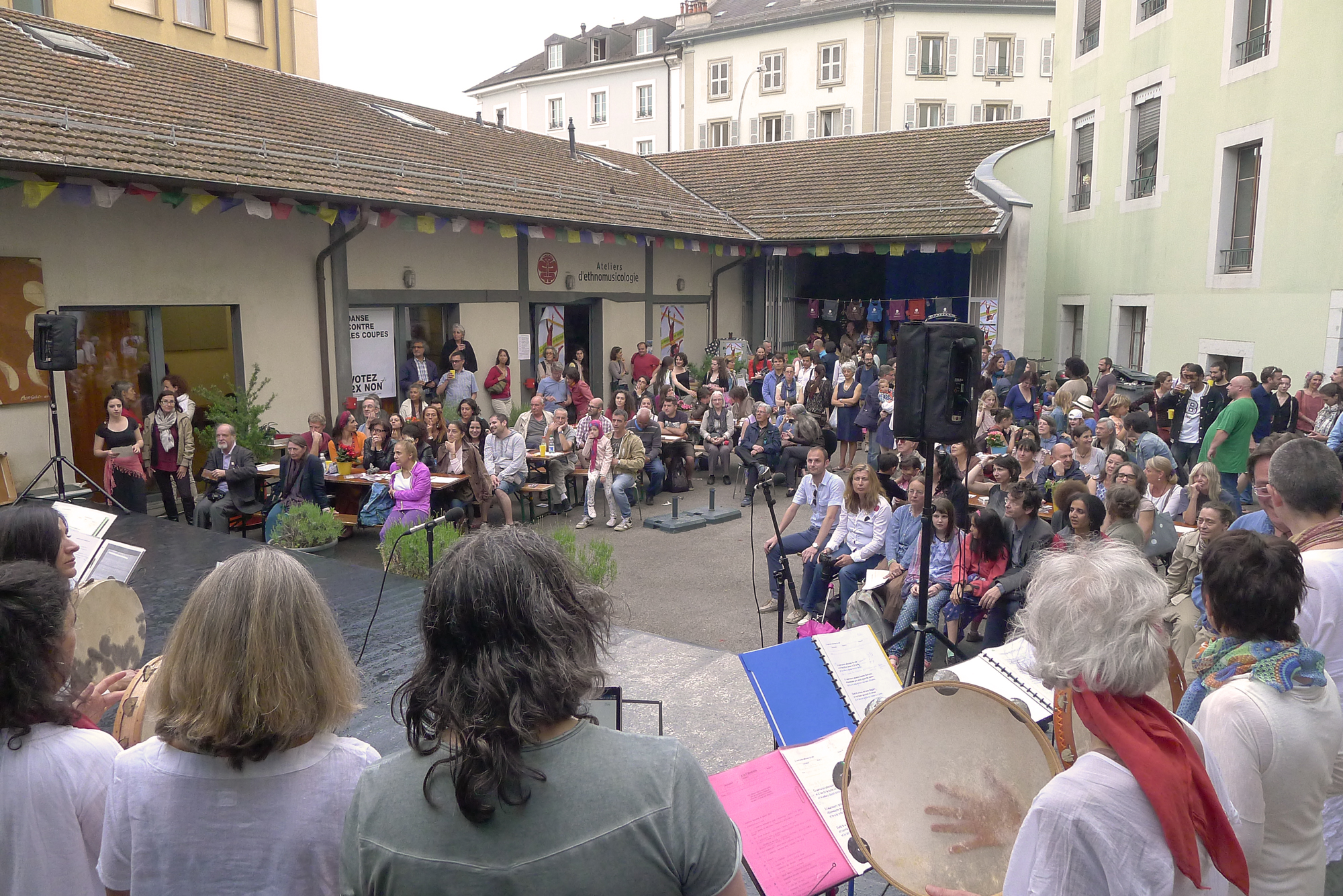 Démonstration dans la cours des ADEM, au 10 rue de Montbrillant, Genève, à l'occasion de la journée Portes Ouvertes 2016